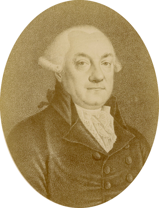 Christian-Frédéric Pfeffel; Christian Frederic de Pfeffel von Kriegelstein; Bruder des Gottlieb Konrad Pfeffel (1736-1809); Biographies alsaciennes avec portraits en photographie, série 1